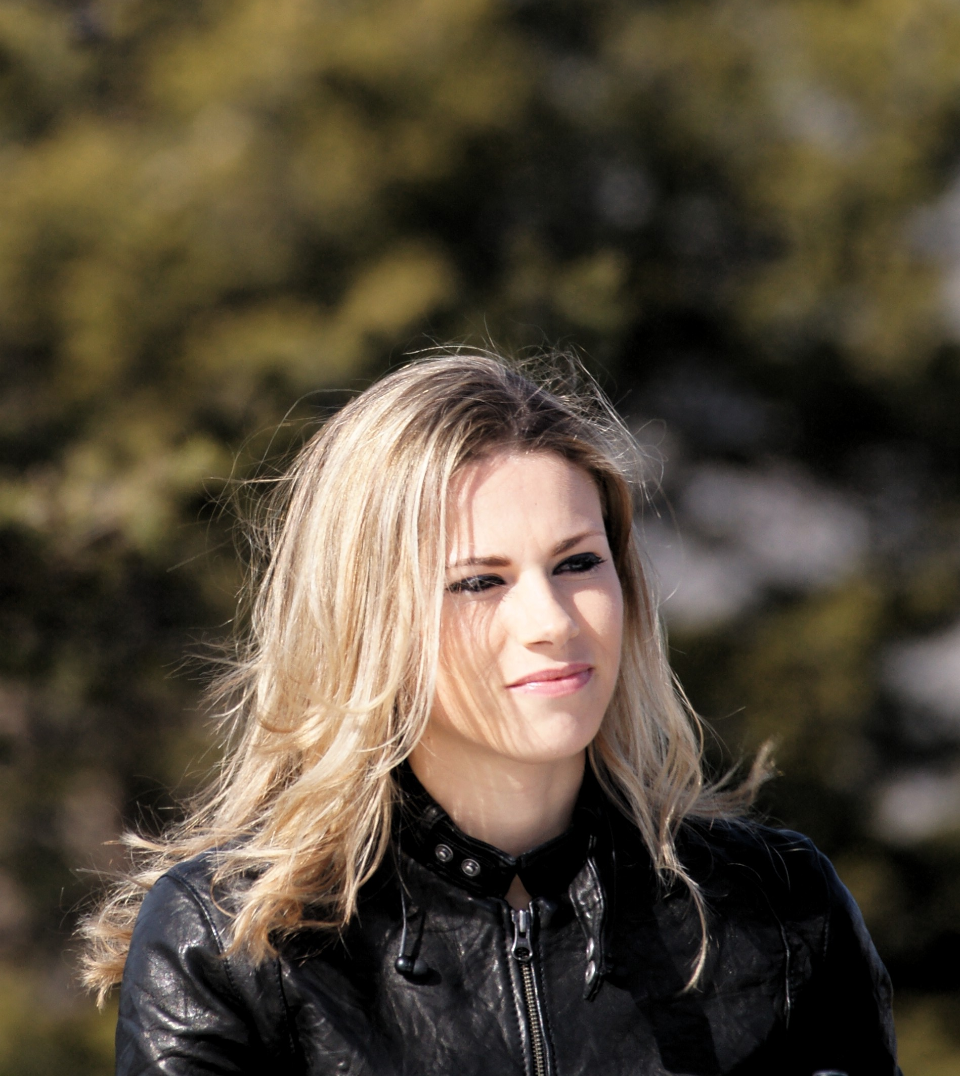 Marion Rousse Madone d'Utelle 2016